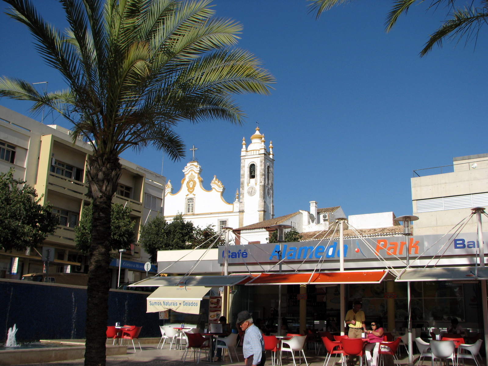 Portimao Cafe - The Algarve, Portugal